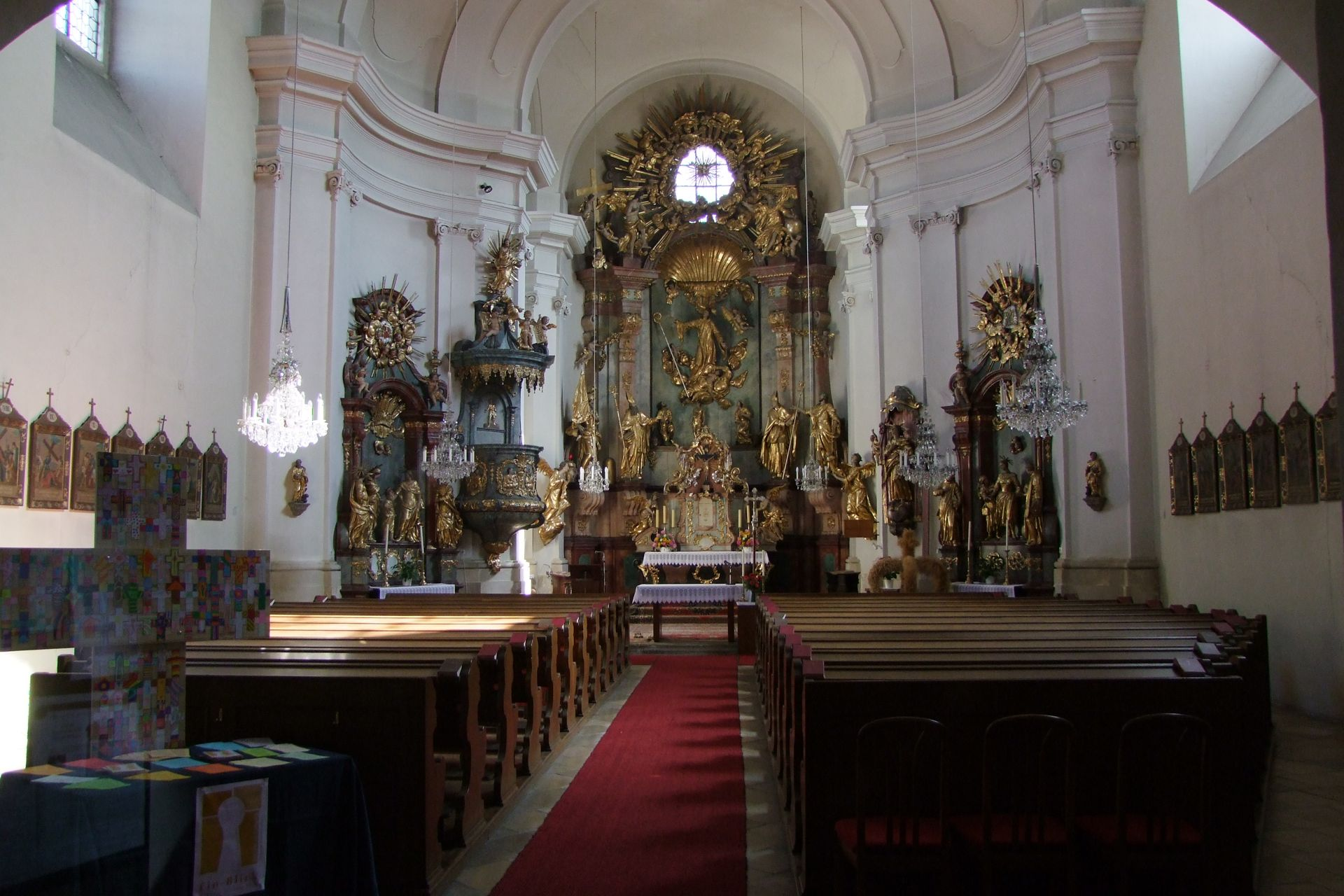 Kath. Pfarrkirche hl. Leonhard